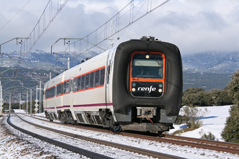 TRD 594.108 procedente de Salamanca con destino Madrid Chamartin a su paso por las Zorreras. 14/12/2008